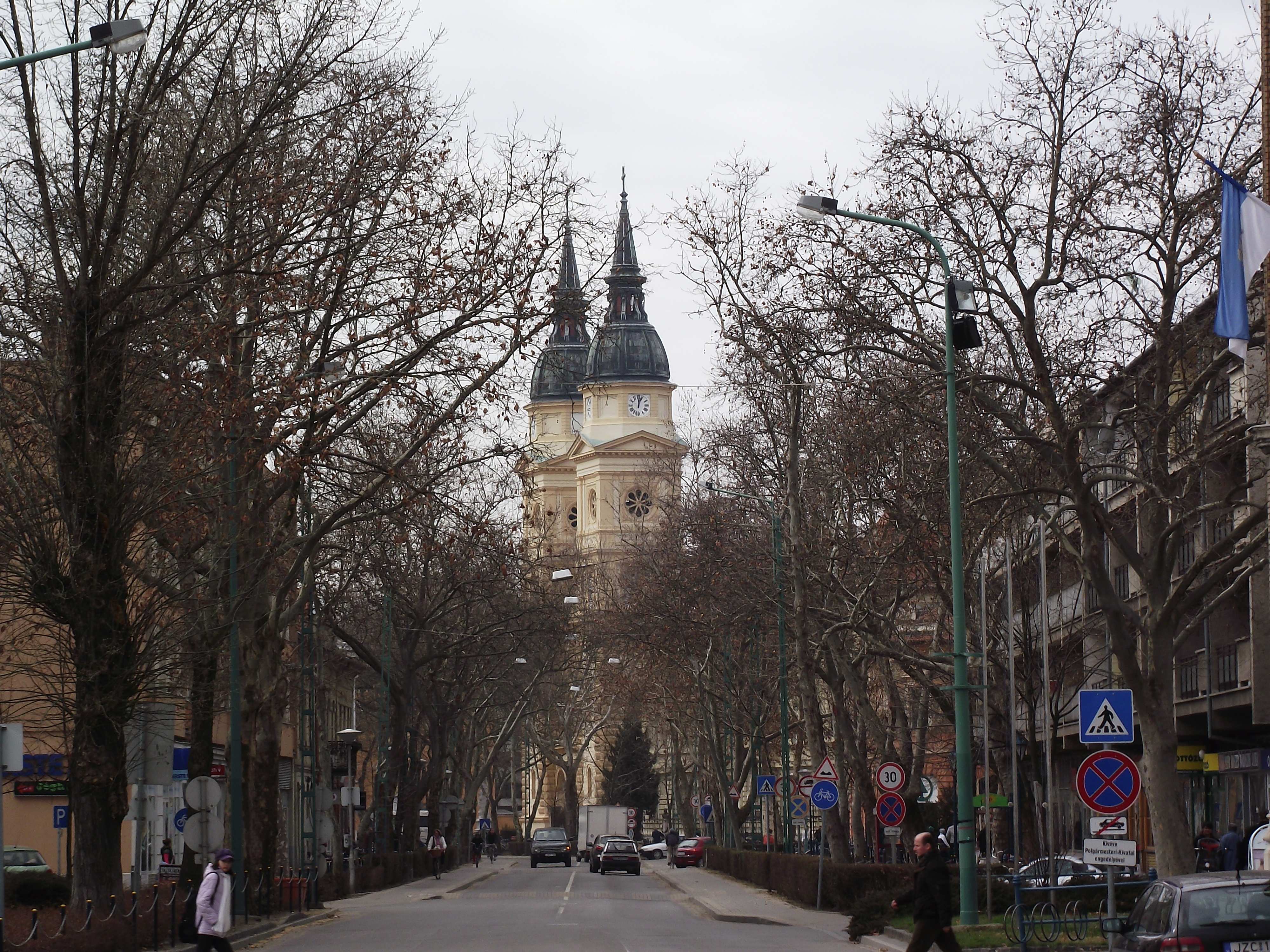 Lásd a címet